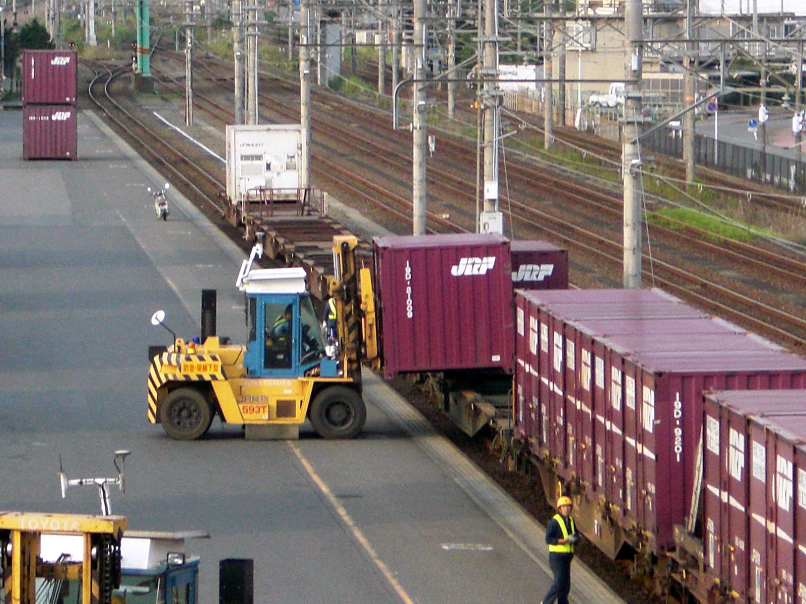 静岡市駿河区池田、JR貨物 静岡貨物駅。下り着発荷役線での荷役作業。貨車上には架線がある。